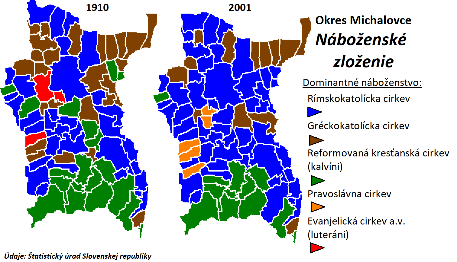 Dominantné náboženstvá v obciach v okrese Michalovce podľa sčítaní v roku 1910 a 2001.